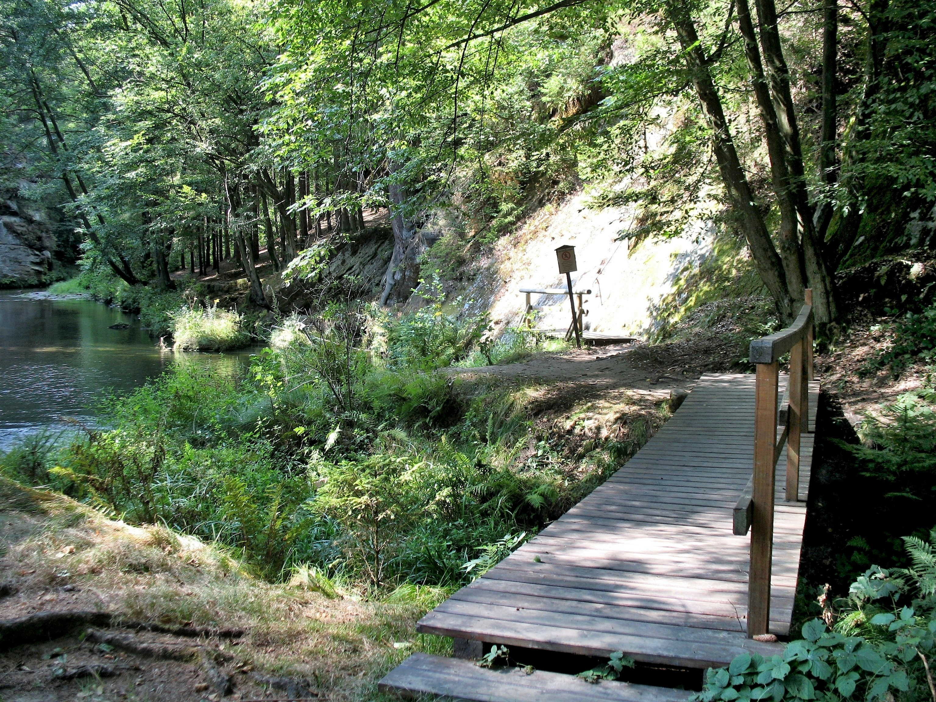 Jetřichovická Bělá mezi Starým mlýnem a ústím do řeky Kamenice, Jetřichovice, Národní park České Švýcarsko. Lávka přes Jetřichovickou Bělou v místě jejího ústí do Kamenice